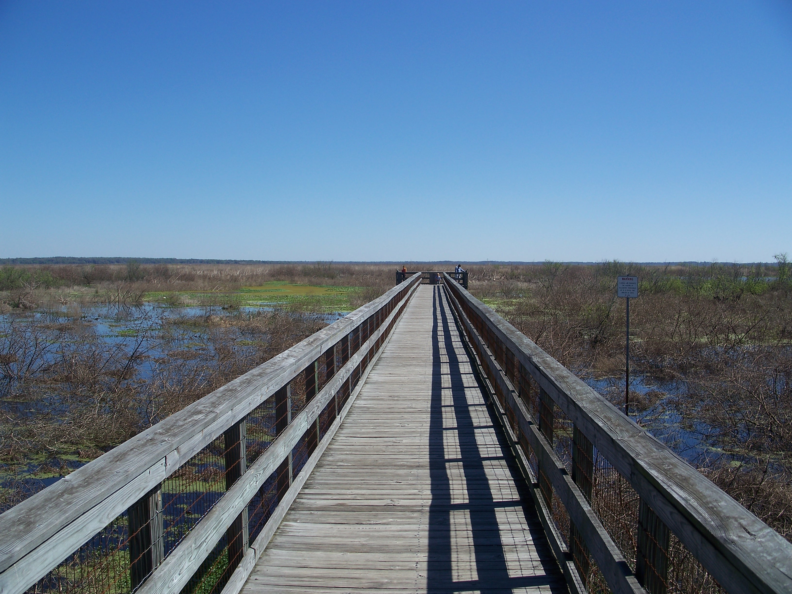 Paynes Prairie overlook boardwalk, looking east.